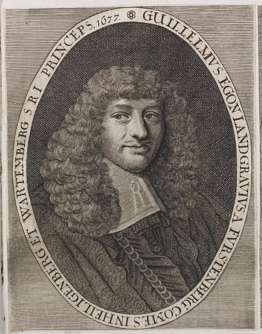 Grafik aus dem Klebeband Nr. 2 der Fürstlich Waldeckschen Hofbibliothek Arolsen Motiv: Wilhelm Egon von Fürstenberg-Heiligenberg, Bischof von Straßburg